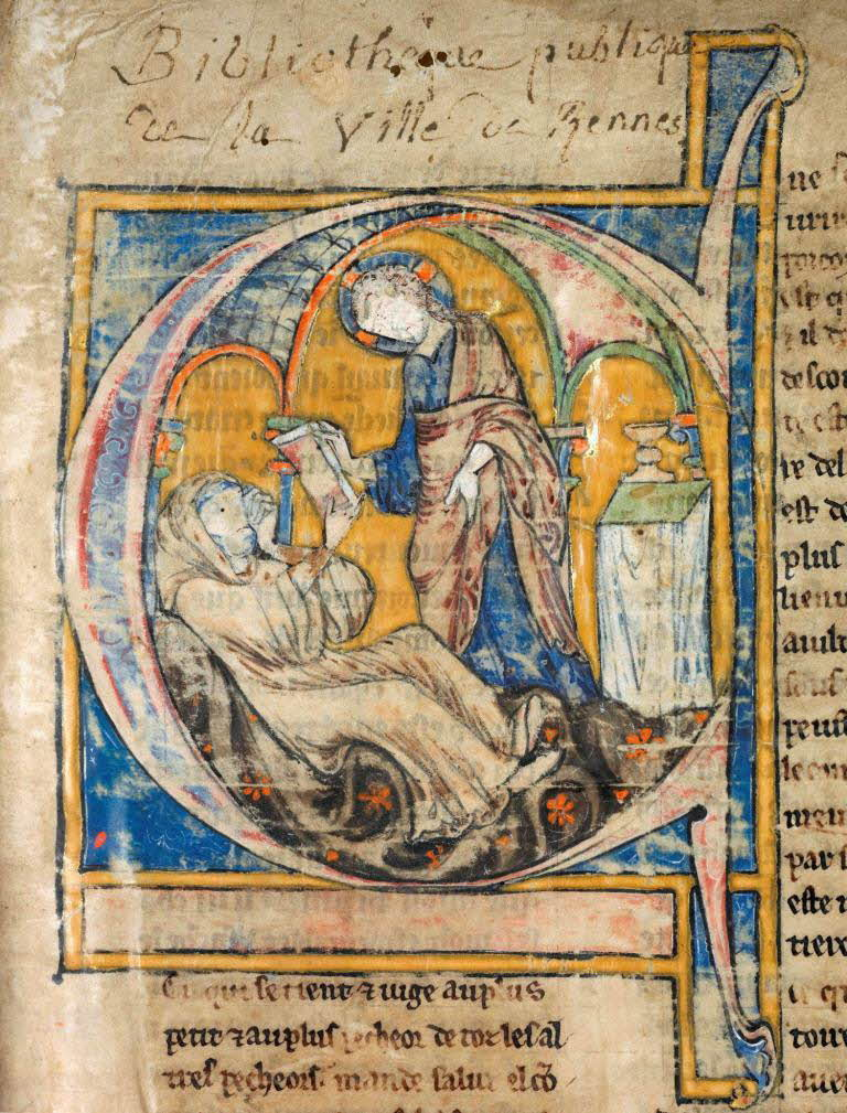 Initiale historiée tirée du Recueil de Romans de la Table Ronde, vers 1220. Le Christ tend un livre à l'auteur